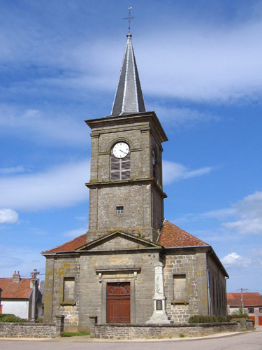 Eglise Saint-Pierre